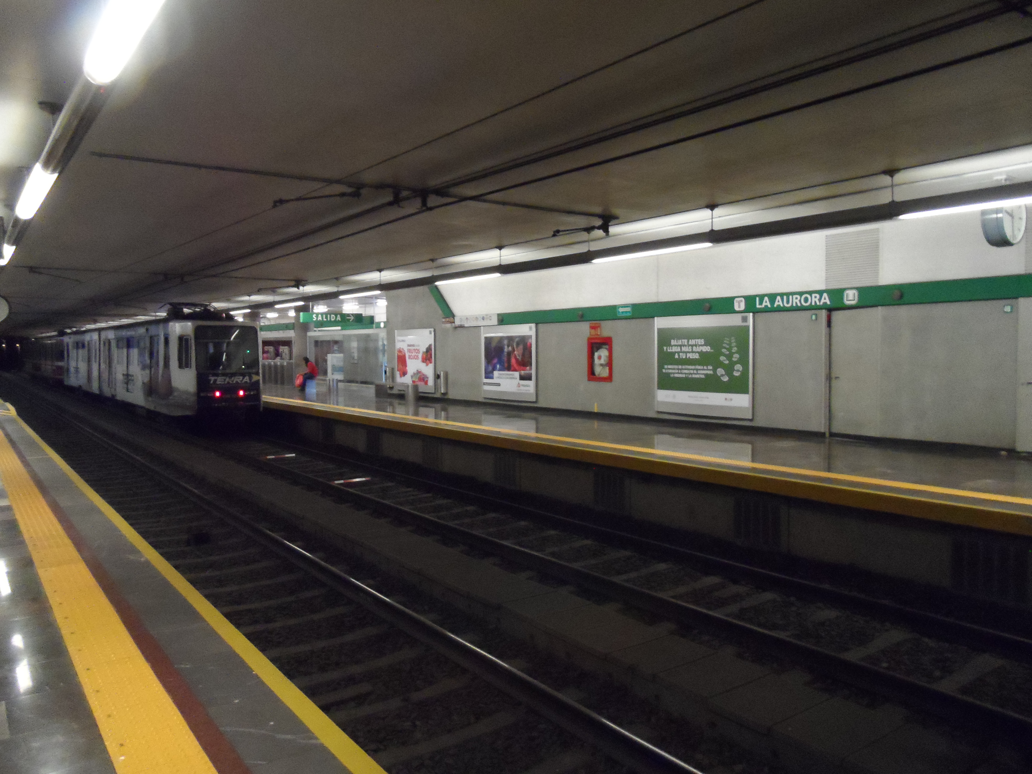 La estación "La Aurora" de la Línea 2 del Tren Ligero de Guadalajara, hacia el fondo se ve un tren TEG-90 estacionado.